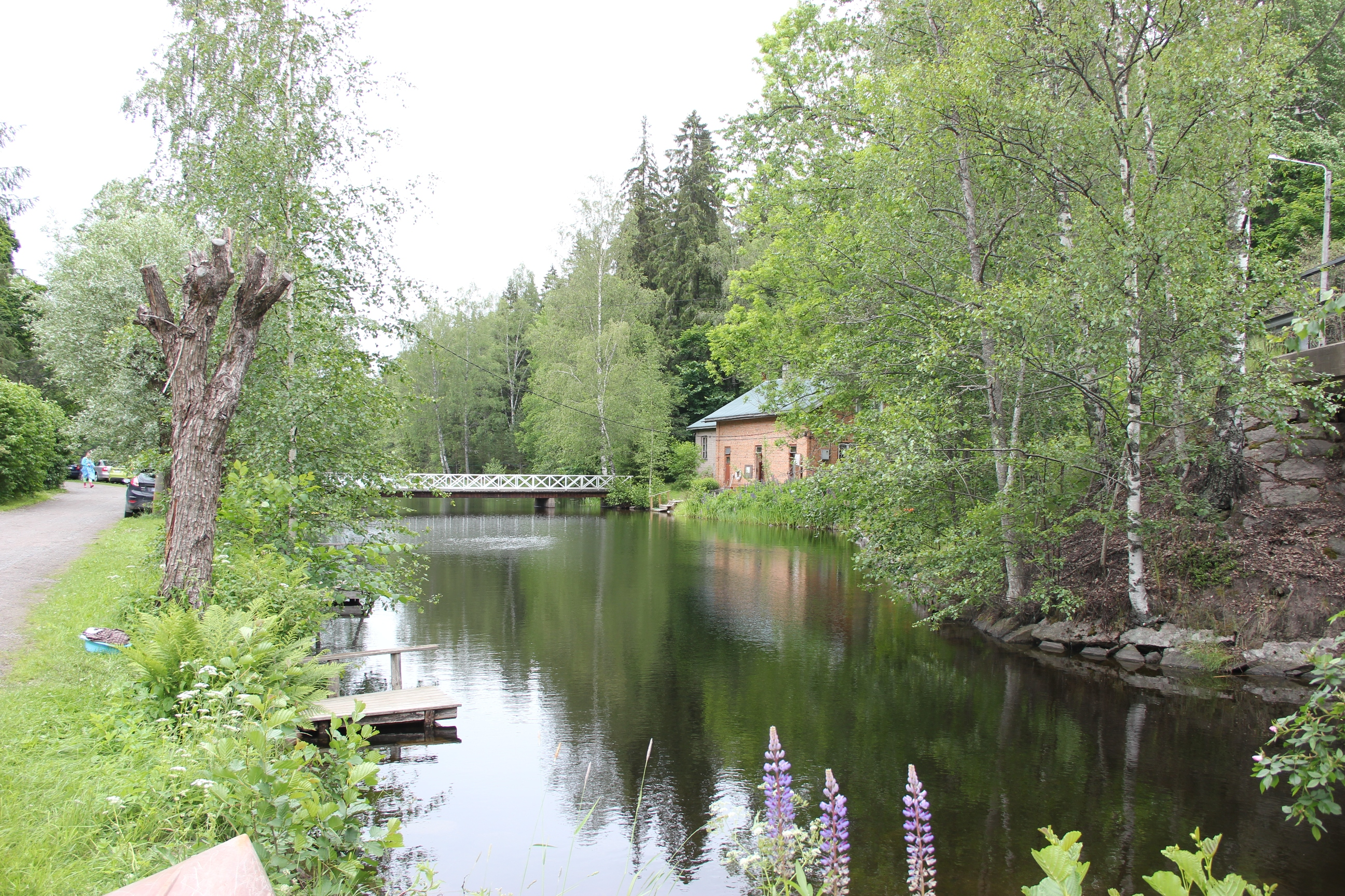 Anskunjoki, oikealla ruukin asuntojen asukkaiden sauna ja pesutupa